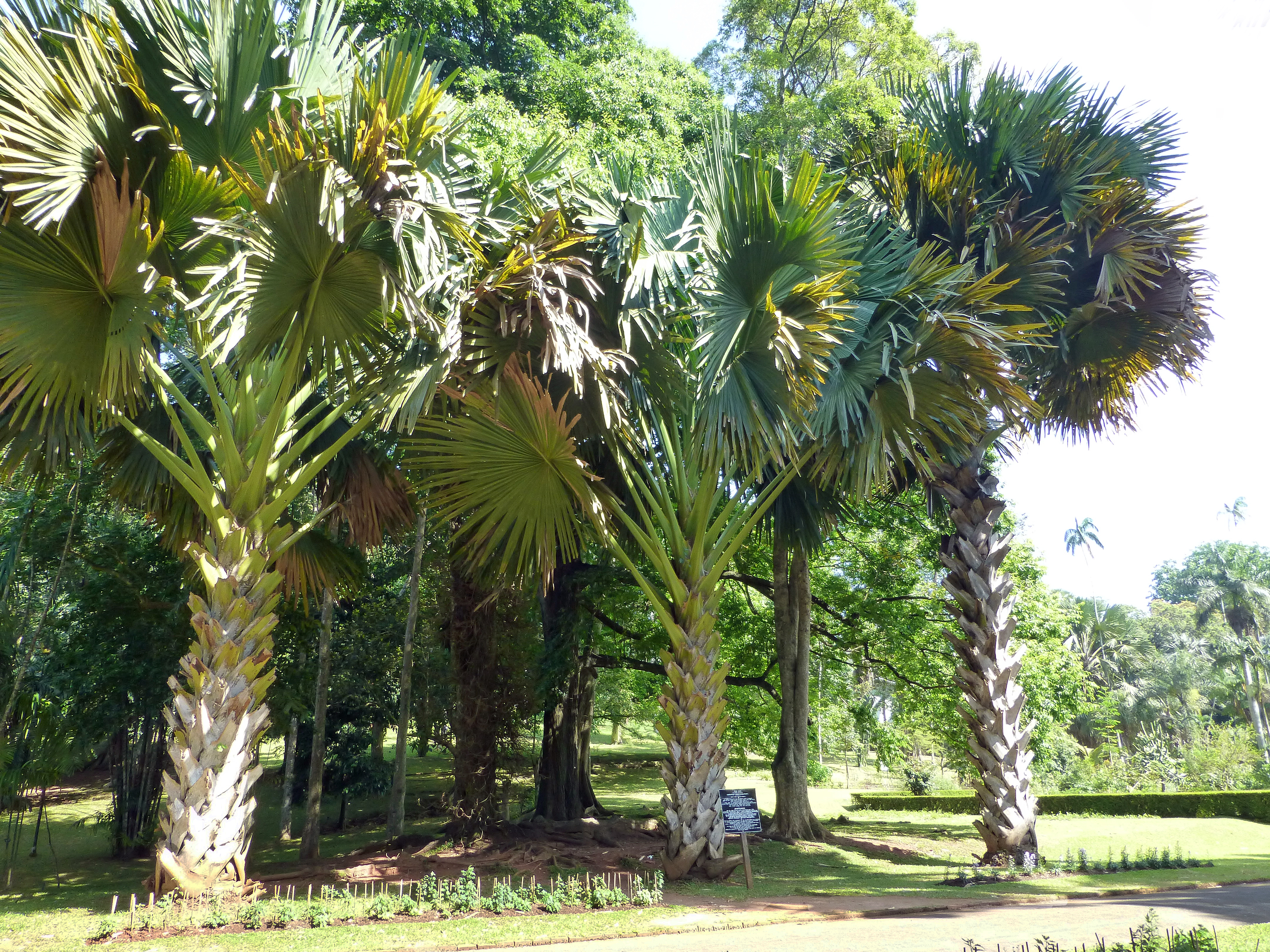 Talipot palm (Corypha umbraculifera) au Jardin botanique de Kandy (Sri Lanka). Origine : Sri Lanka, sud de l'Inde